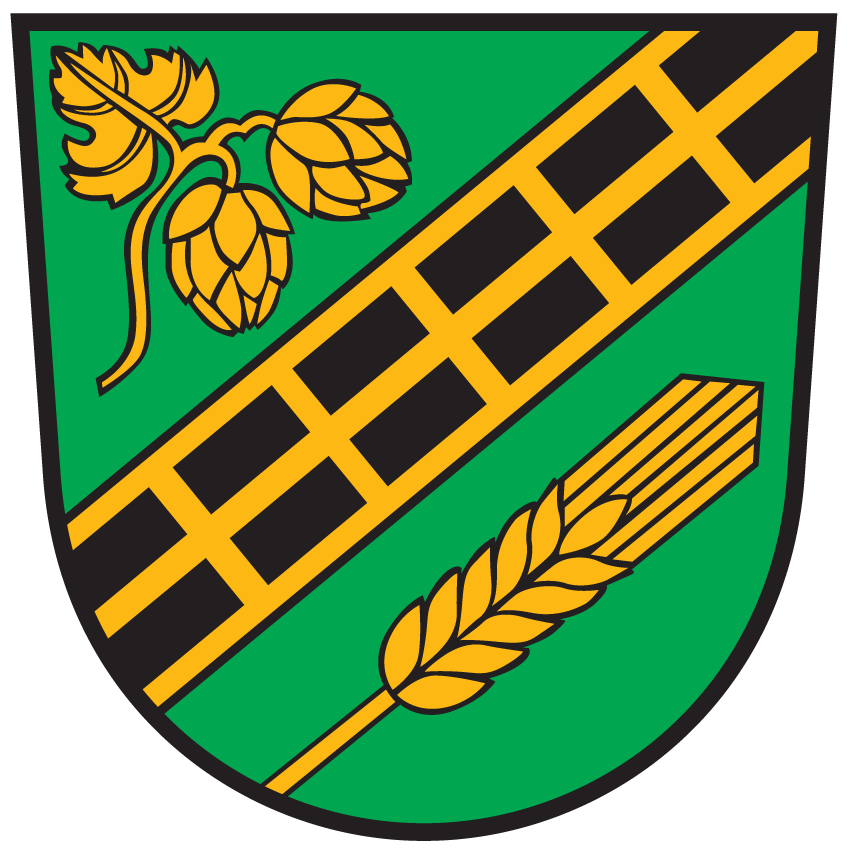 Wappen von Micheldorf